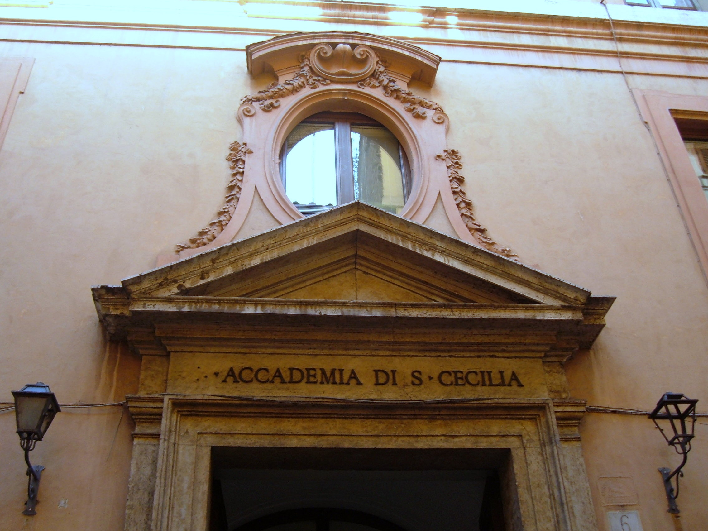 Ingresso dell'Accademia di Santa Cecilia, a Roma, in via Vittoria (rione Campo Marzio).